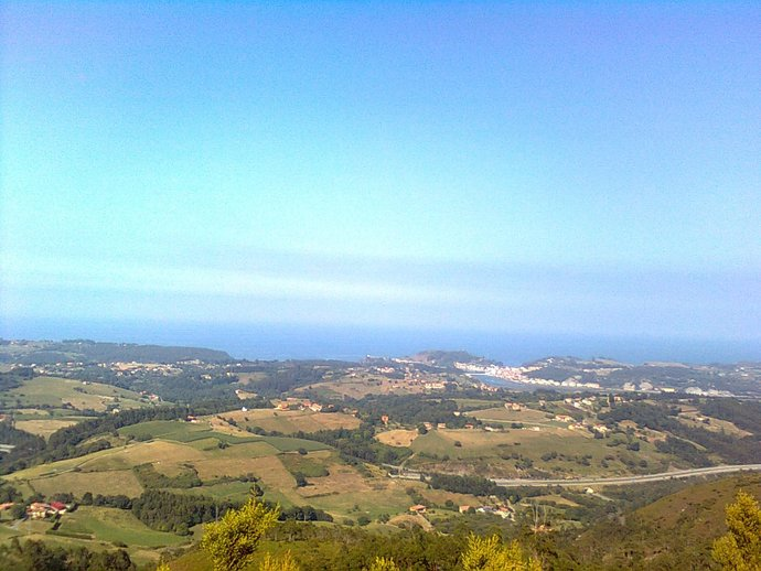 Panorámica del concejo de Ribadesella desde el Monte Moro